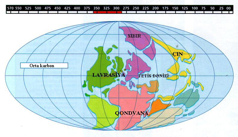 Orta Karbonda materiklərin düzülüşü.